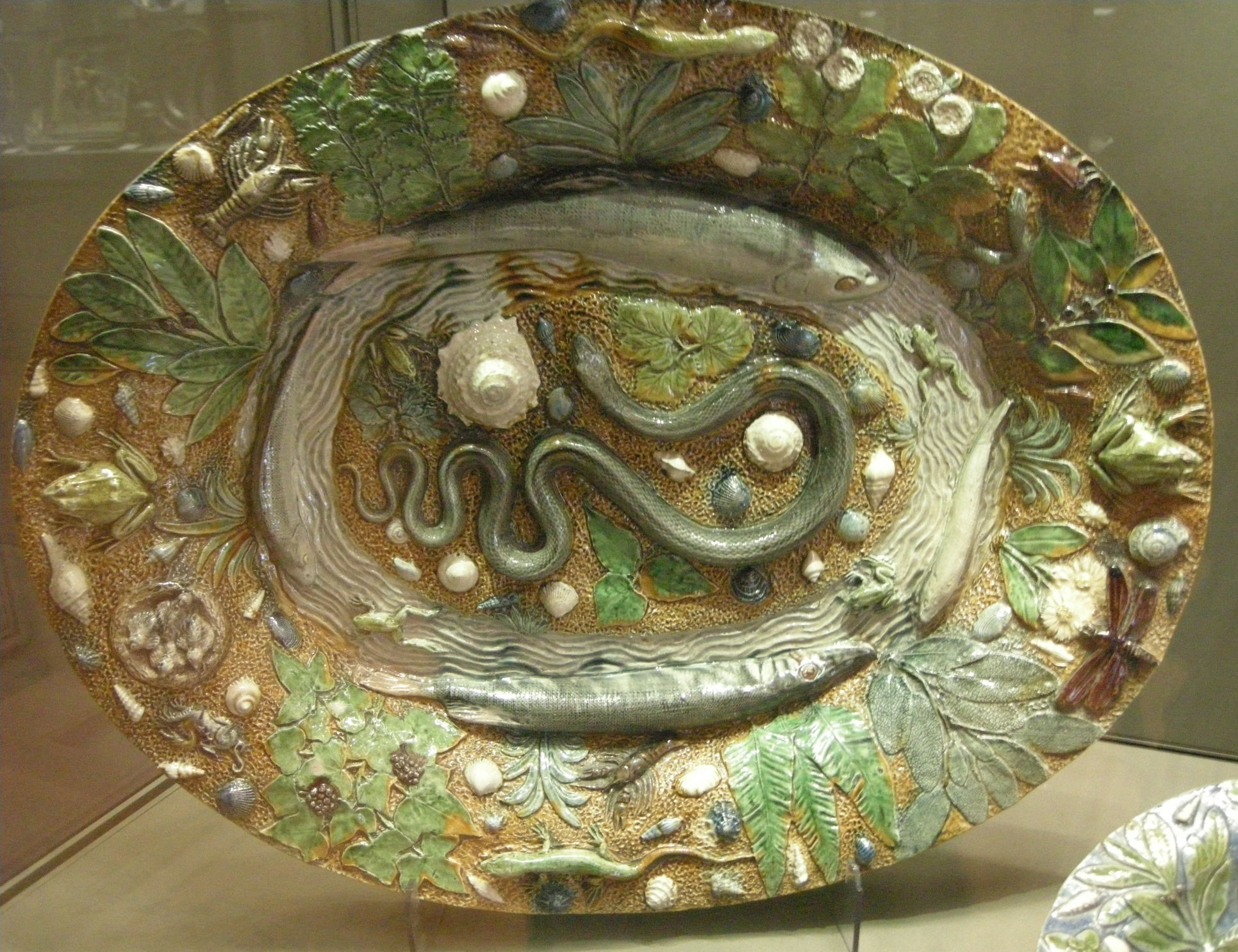 Vassoio rustico 05.JPG